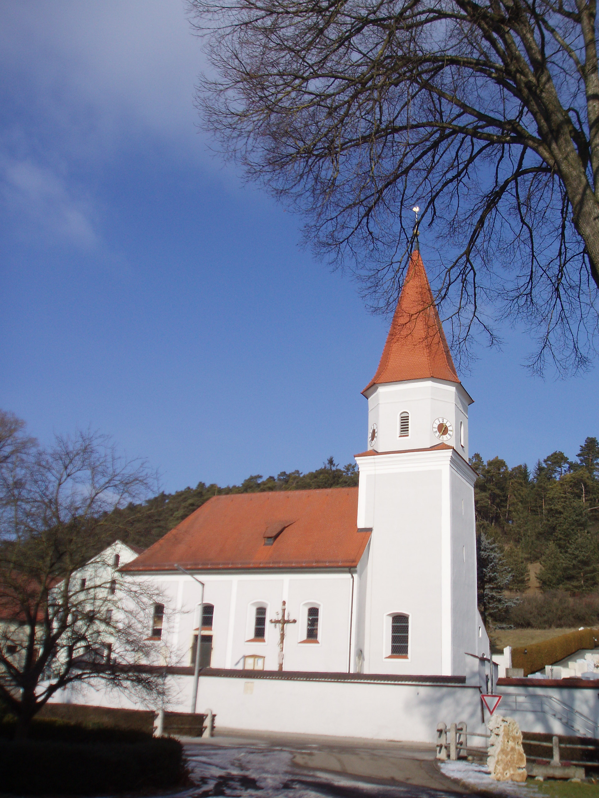 Morsbach_Gemeinde_Titting_Landkreis_Eichstätt,_Kirche_außen